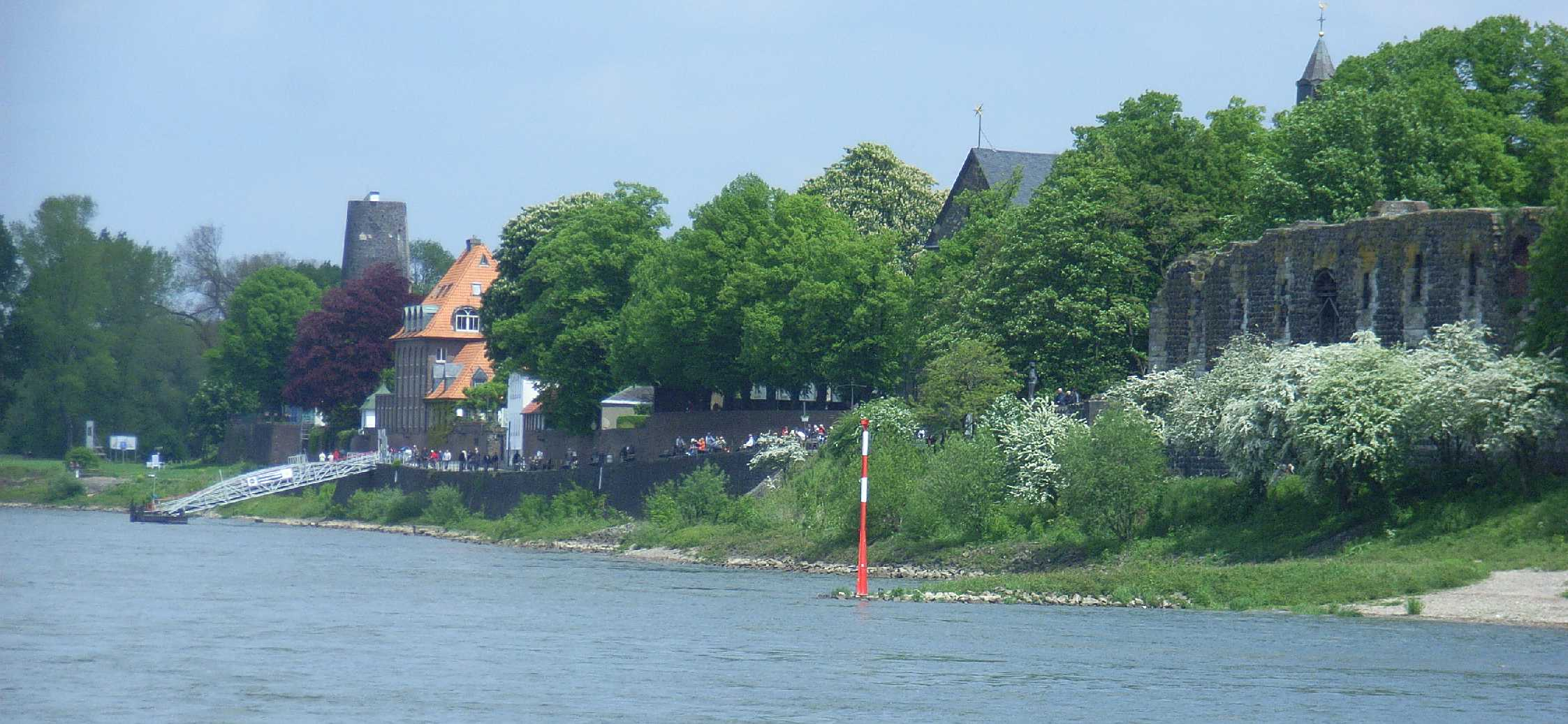 Rheinufer Düsseldorf-Kaiserswerth mit Windmühlenturm links und Kaiserpfalz rechts